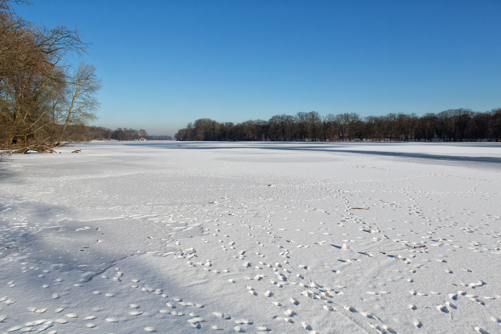 Vereister und mit Schnee bedeckter Tegeler See. Blick von Tegelort auf Scharfenberg und die Scharfenberger Fähre.